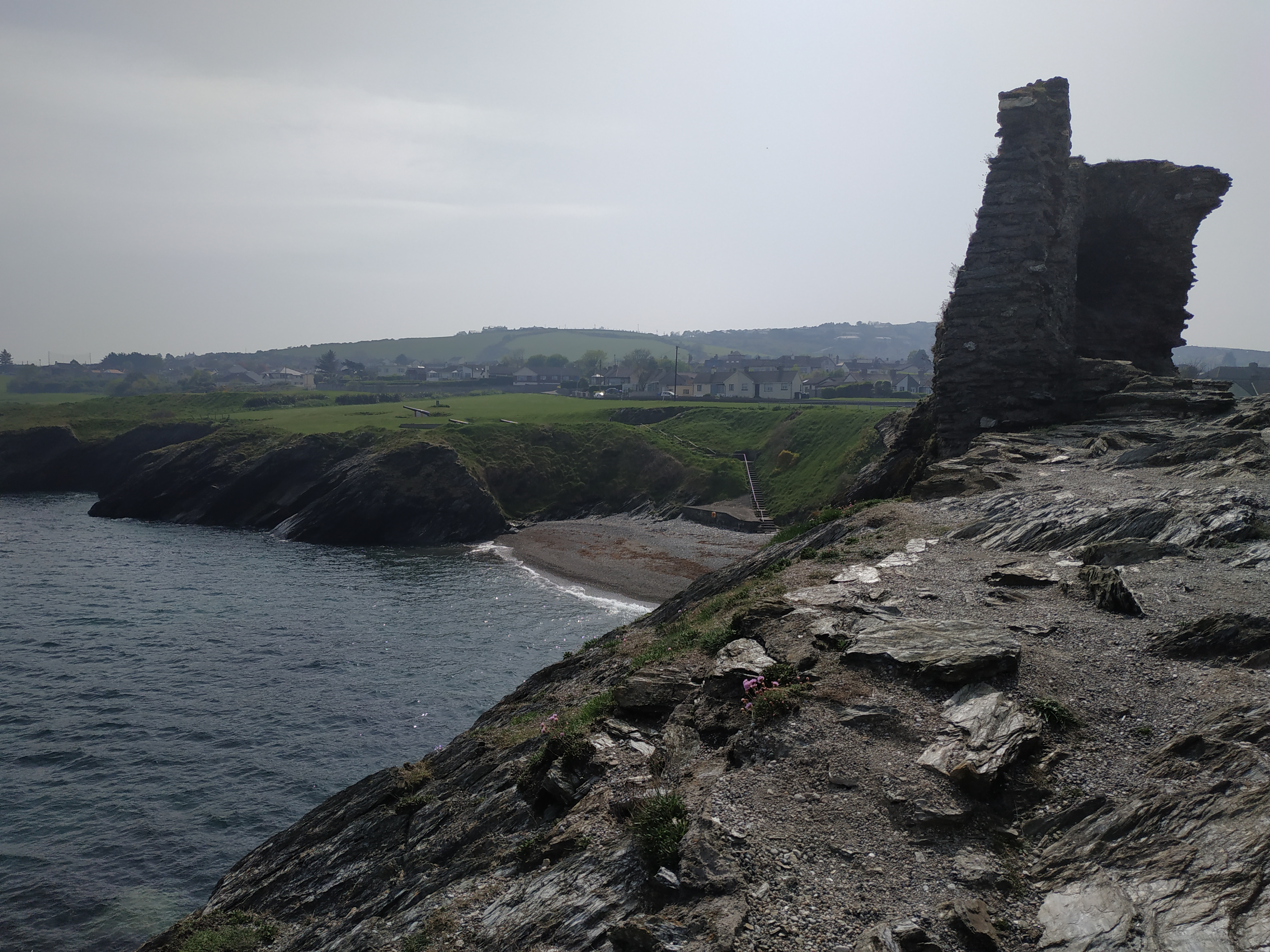 Castillo Black en la actualidad (2019), Wicklow, República de Irlanda.